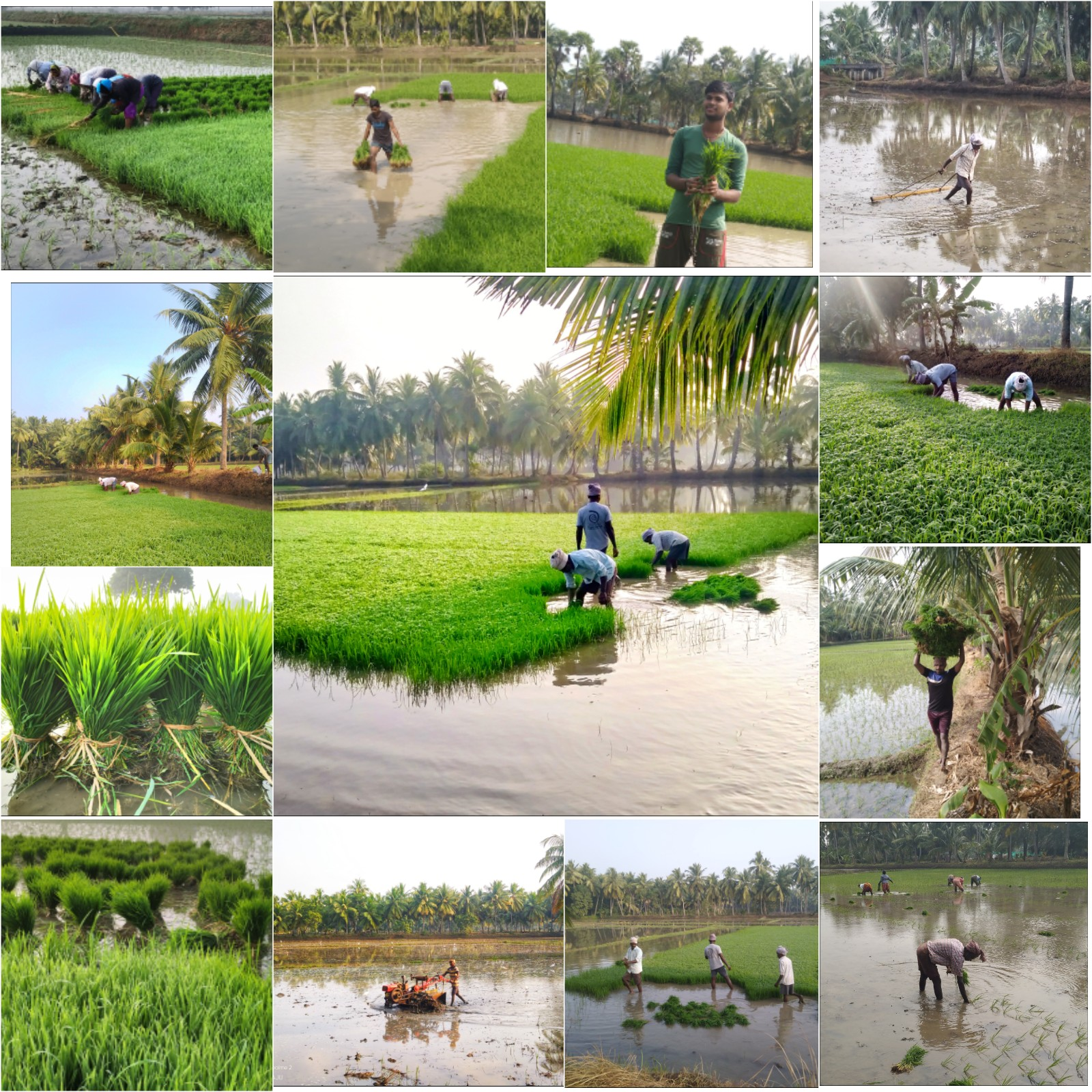 వ్యవసాయానికి సిద్ధం చేస్తున్న పొలంలో చిత్రాలు